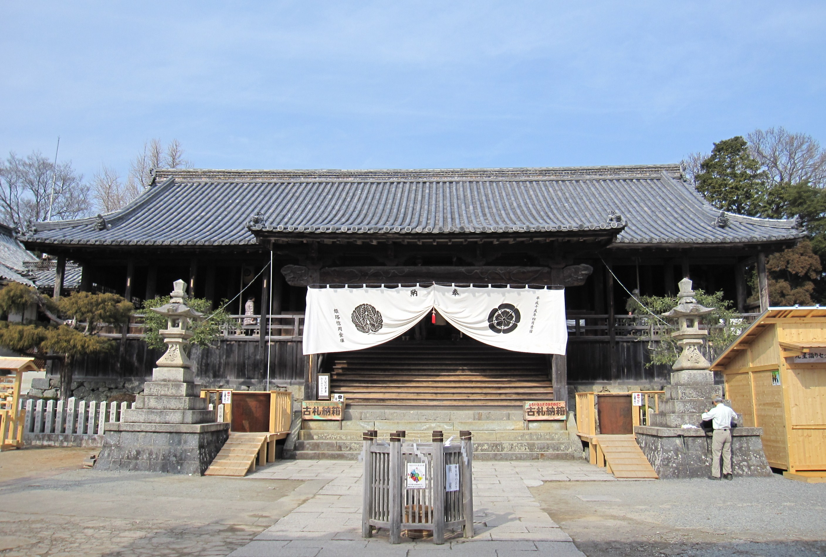 広峰神社拝殿